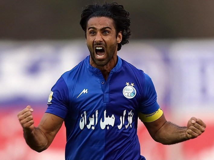 دیدار تیمهای استقلال و نفت تهران در مهر ۱۳۹۲ که با تساوی ۱-۱ به پایان رسید؛ در این دیدار فرهاد مجیدی برای استقلال و وریا غفوری برای نفت گل زدند.